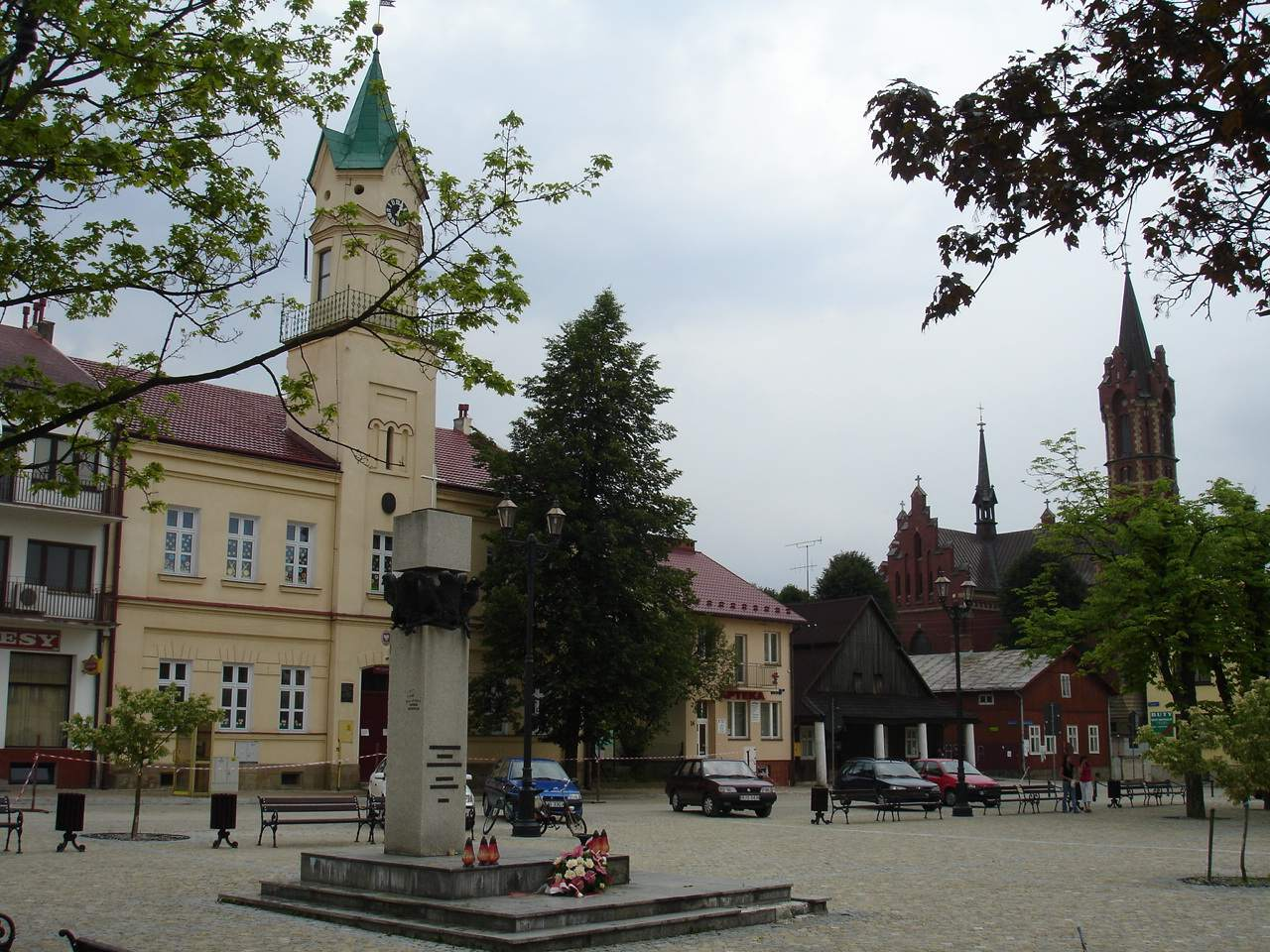 village Kołaczyce